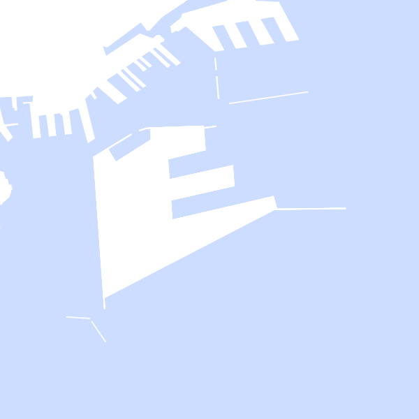 昭和40年ポートアイランド構想図